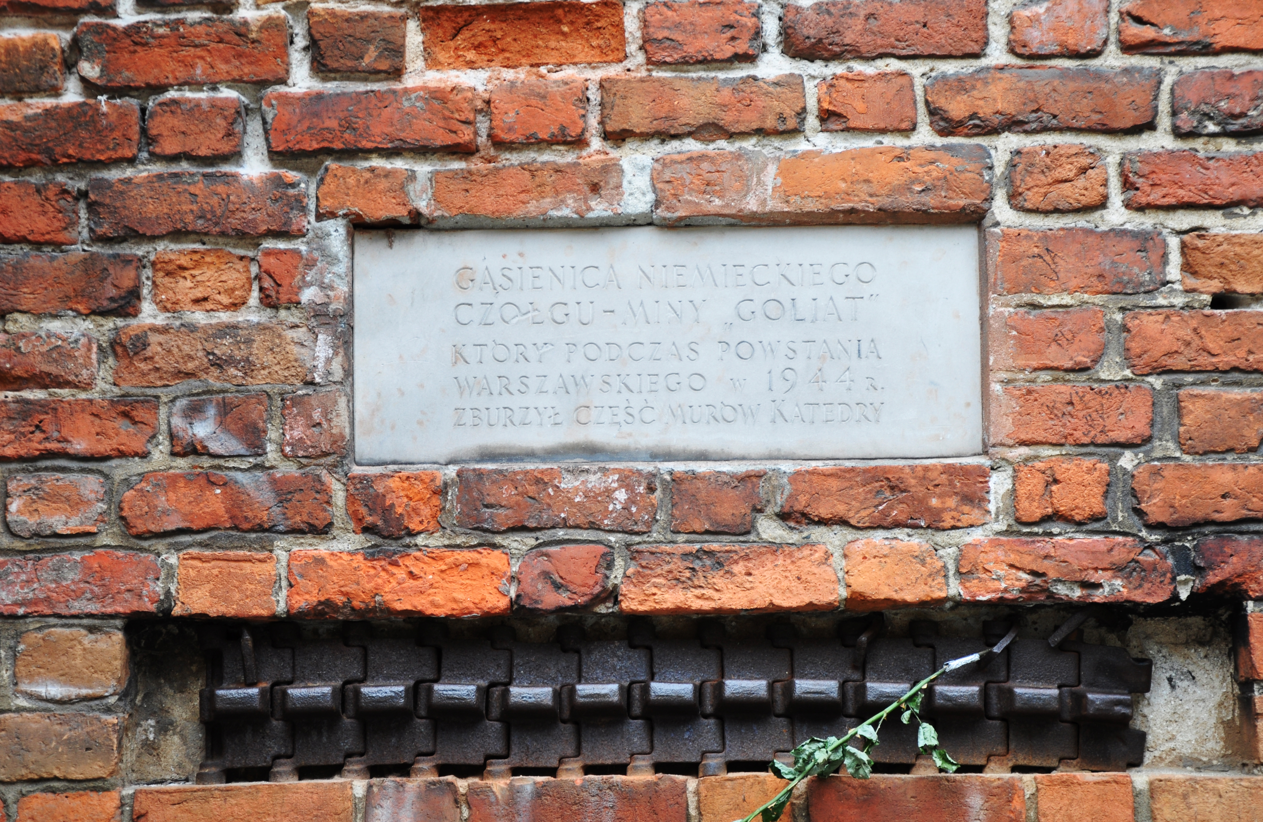 Deutsches Panzerkettenfragment (WWII, Goliath) in Kirche Altstadt Warschau eingemauert. Johanneskathedrale, Warschau.